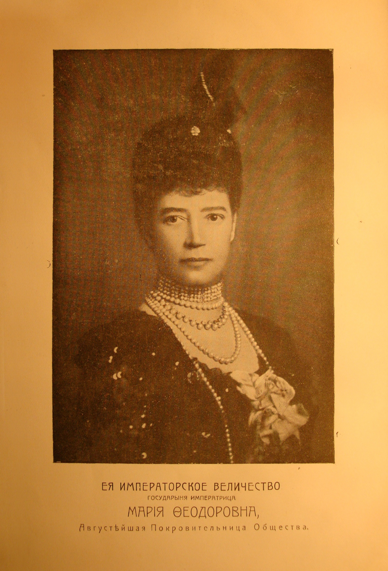 რუსეთის იმპერატრიცა მარია